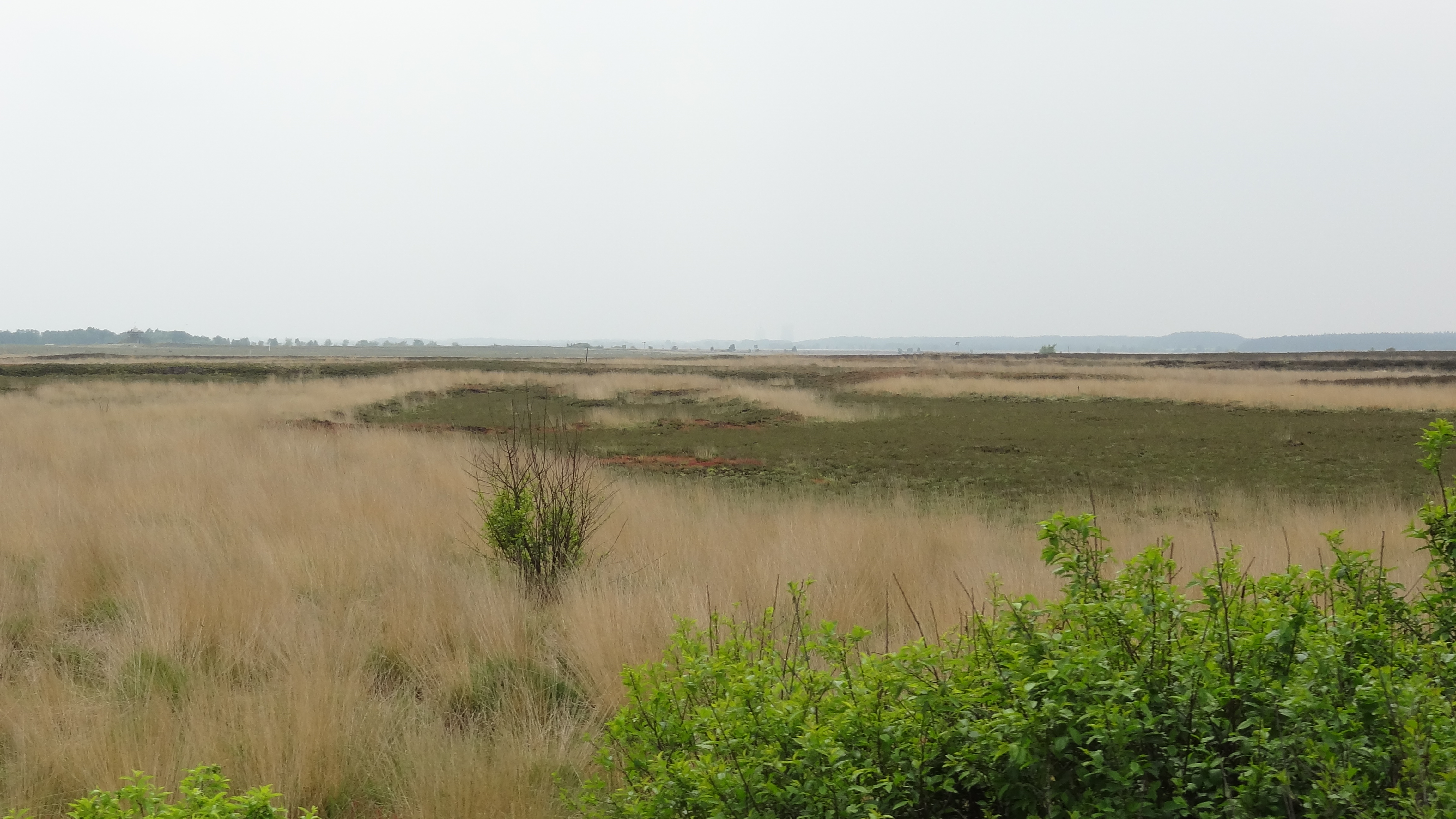 Blick auf das Naturschutzgebiet Sprakeler Heide (Tinner Dose) vom Schlagbrückener Weg (auch Panzer-Straße genannt). Blickrichtung - Westen.